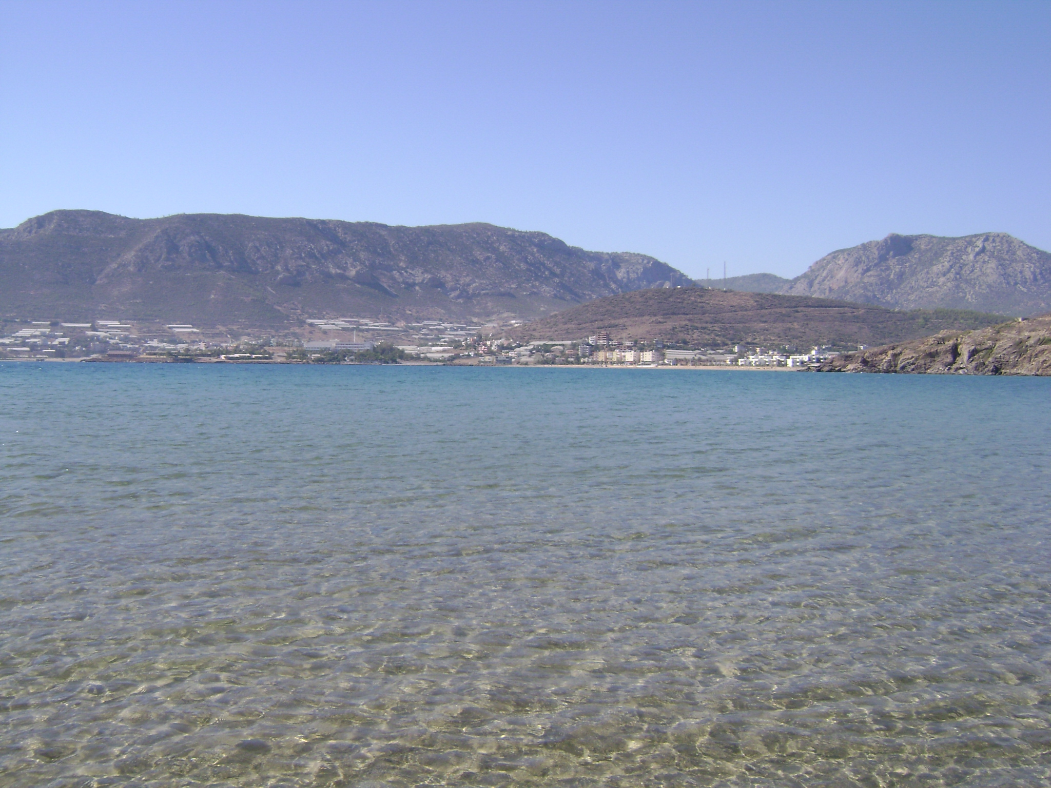 Aydıncık, Mersin